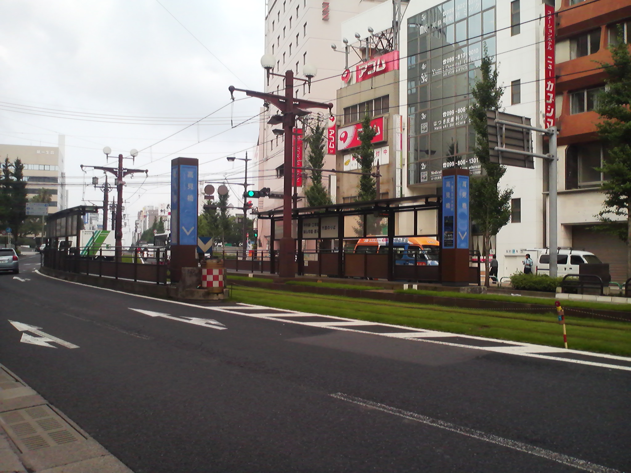 鹿児島市電高見橋駅の外観。